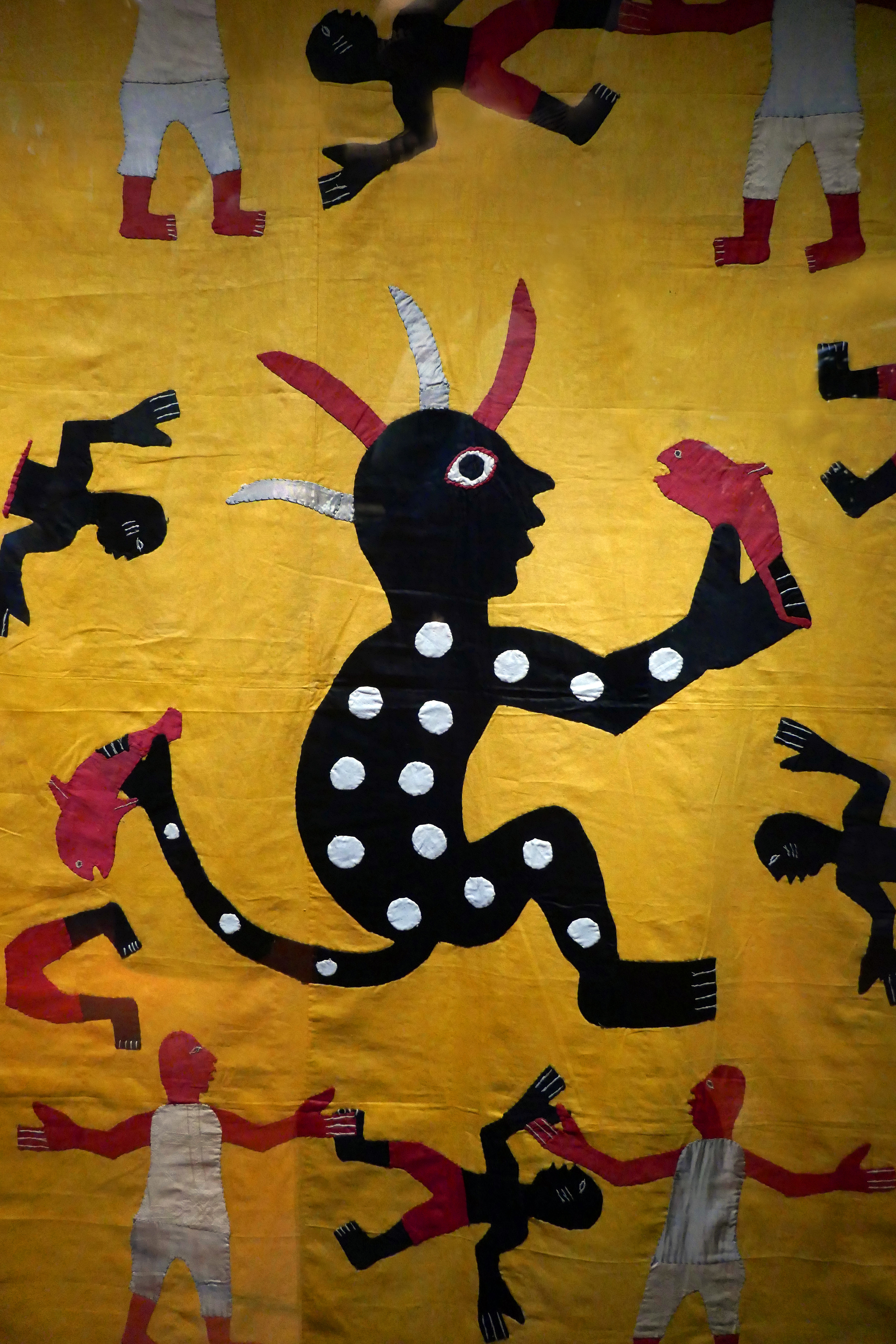 Détail d'une tenture appliquée : Sakpata, le dieu de la variole. Abomey, Bénin. Début du 20e siècle Musée du Quai Branly